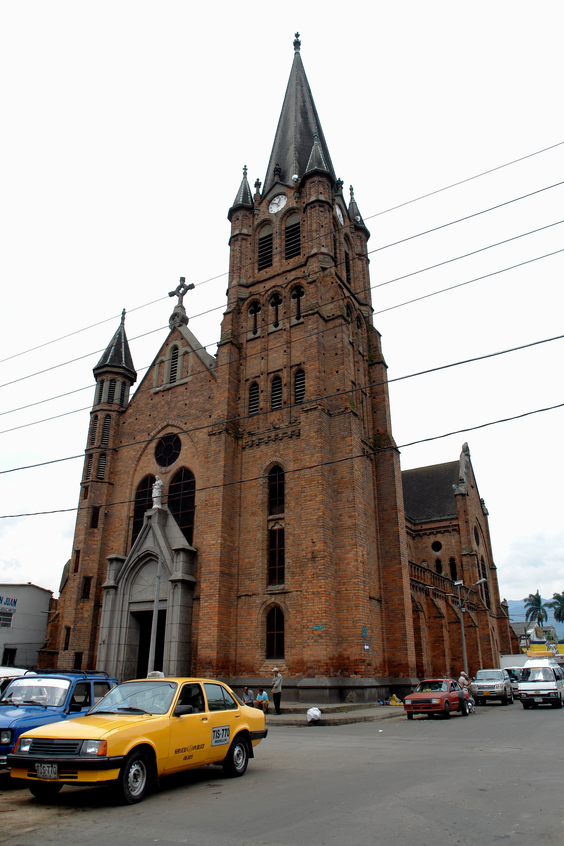 Iglesia del Sagrado Corazón de Jesús, diseñado por el arquitecto belga Agustín Goovaerts. Medellín, Colombia.Medellin DSC02819